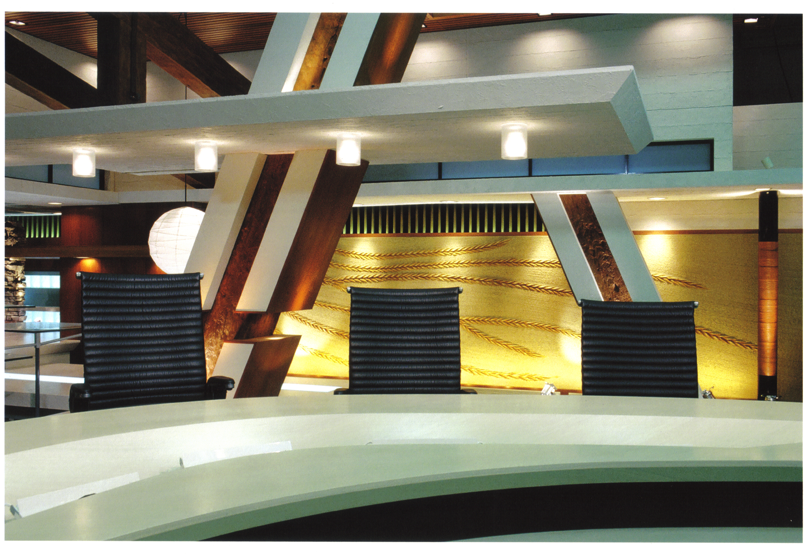 NEWS23 スタジオ 鳳凰の壁